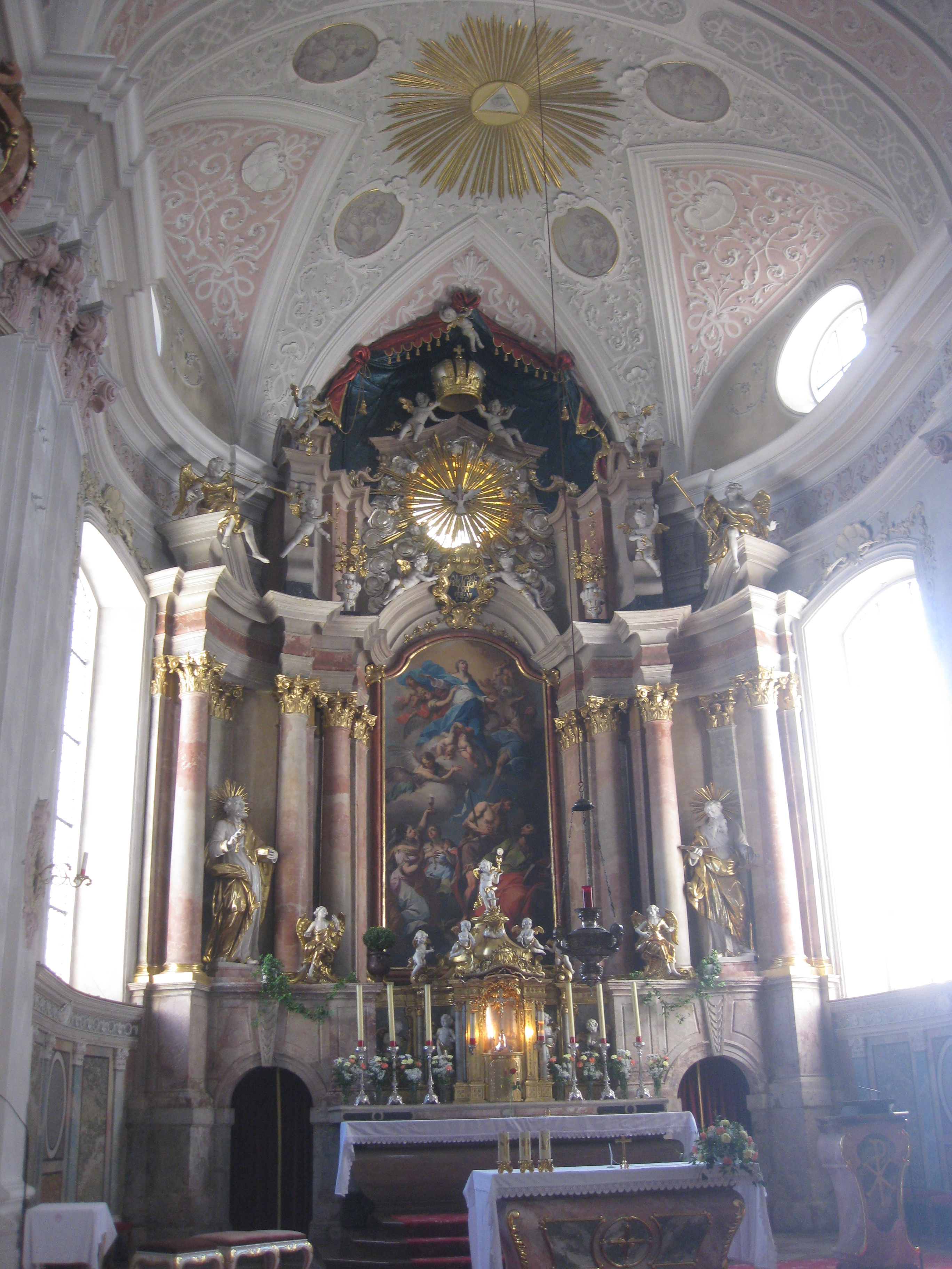 Hochaltar St. Johann in Tirol